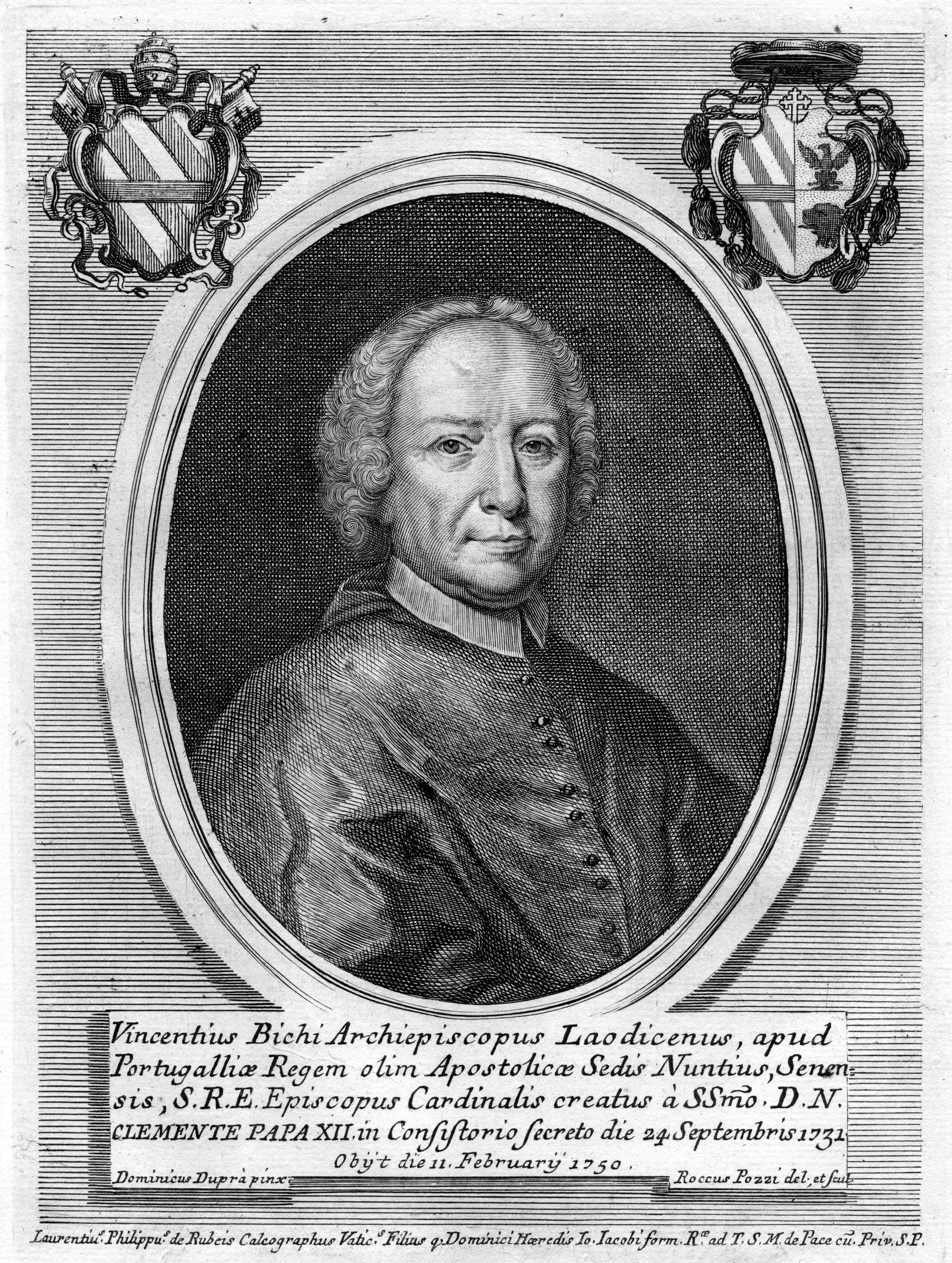 Portrait de Vincenzo Bichi (1668-1750), créé cardinal par le pape Clément XII.